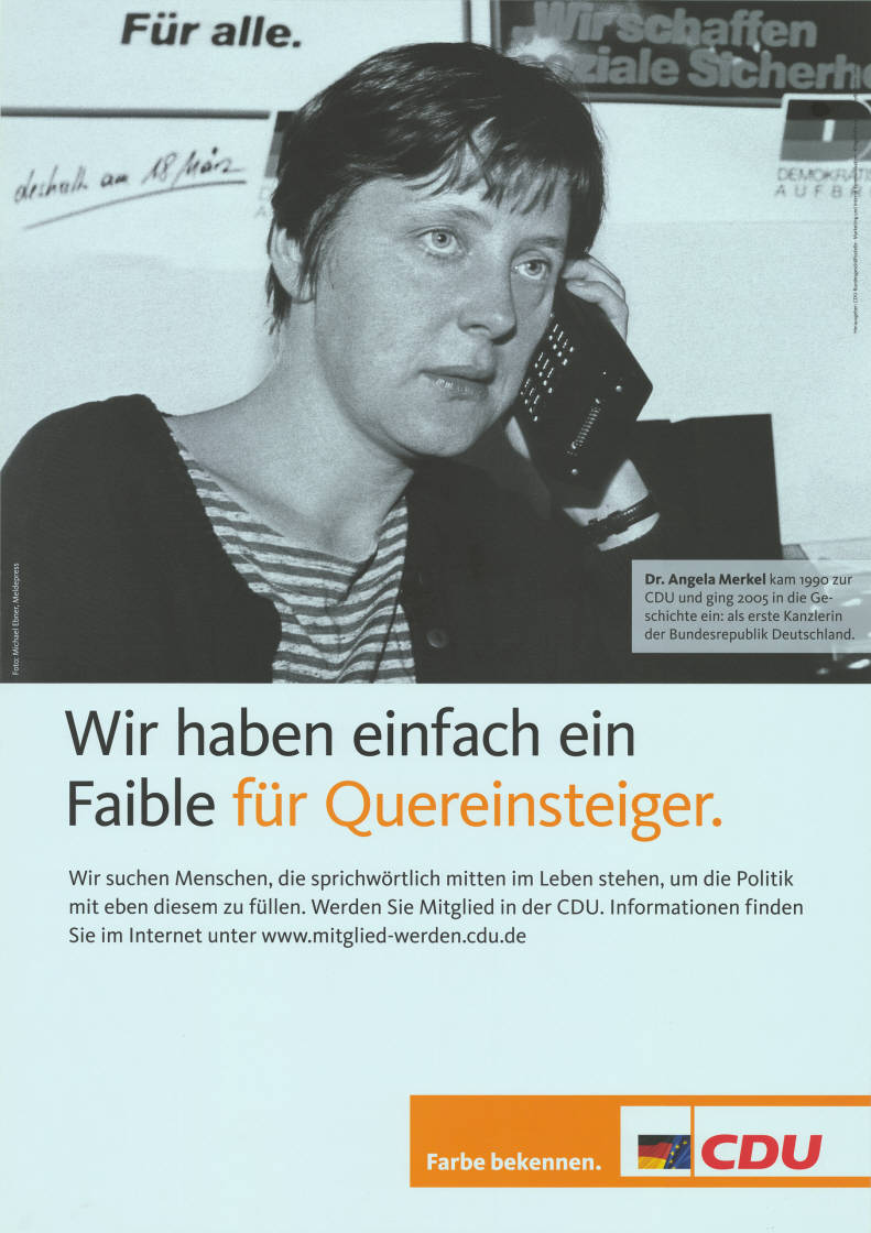 Dr. Angela Merkel kam 1990 zur CDU und ging 2005 in die Geschichte ein: als erste Kanzlerin der Bundesrepublik Deutschland. Wir haben einfach ein Faible für Quereinsteiger. Wir suchen Menschen, die sprichwörtlich mitten im Leben stehen, um die Politik mit eben diesem zu füllen. Werden Sie Mitglied in der CDU. Informationen finden Sie im Internet unter Farbe bekennen. CDUAbbildung:Angela Merkel mit einem SprechgerätPlakatart:Kandidaten-/Personenplakat mit PorträtKünstler_Grafiker:Foto: Michael Ebner, MeldepressAuftraggeber:CDU-Bundesgeschäftsstelle, Marketing und Interne Kommunikation, BerlinObjekt-Signatur:10-031 : 60000Bestand:CDU-Plakate ( 10-031)GliederungBestand10-18:CDU-Plakate (10-031) » Mitgliederwerbeaktion 2007Lizenz:KAS/ACDP 10-031 : 60000 CC-BY-SA 3.0 DE